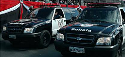 Police car - Civil Police of São Paulo State - Brazil